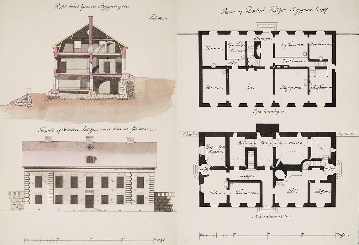 Ritningar för Dalarö tullhus upprättade av arkitekt Erik Palmstedt